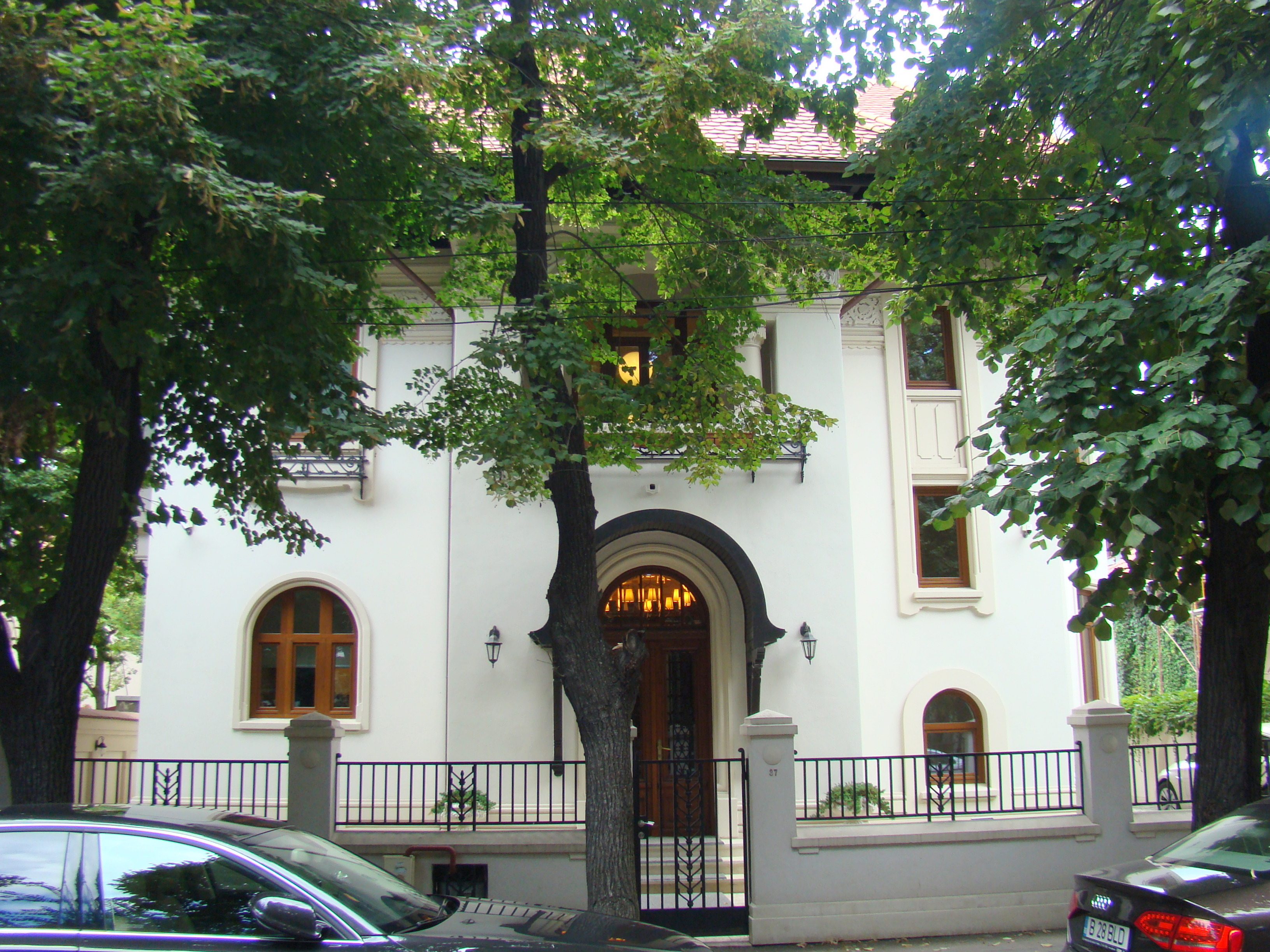 Casă monument istoric, str. Roma, nr. 37